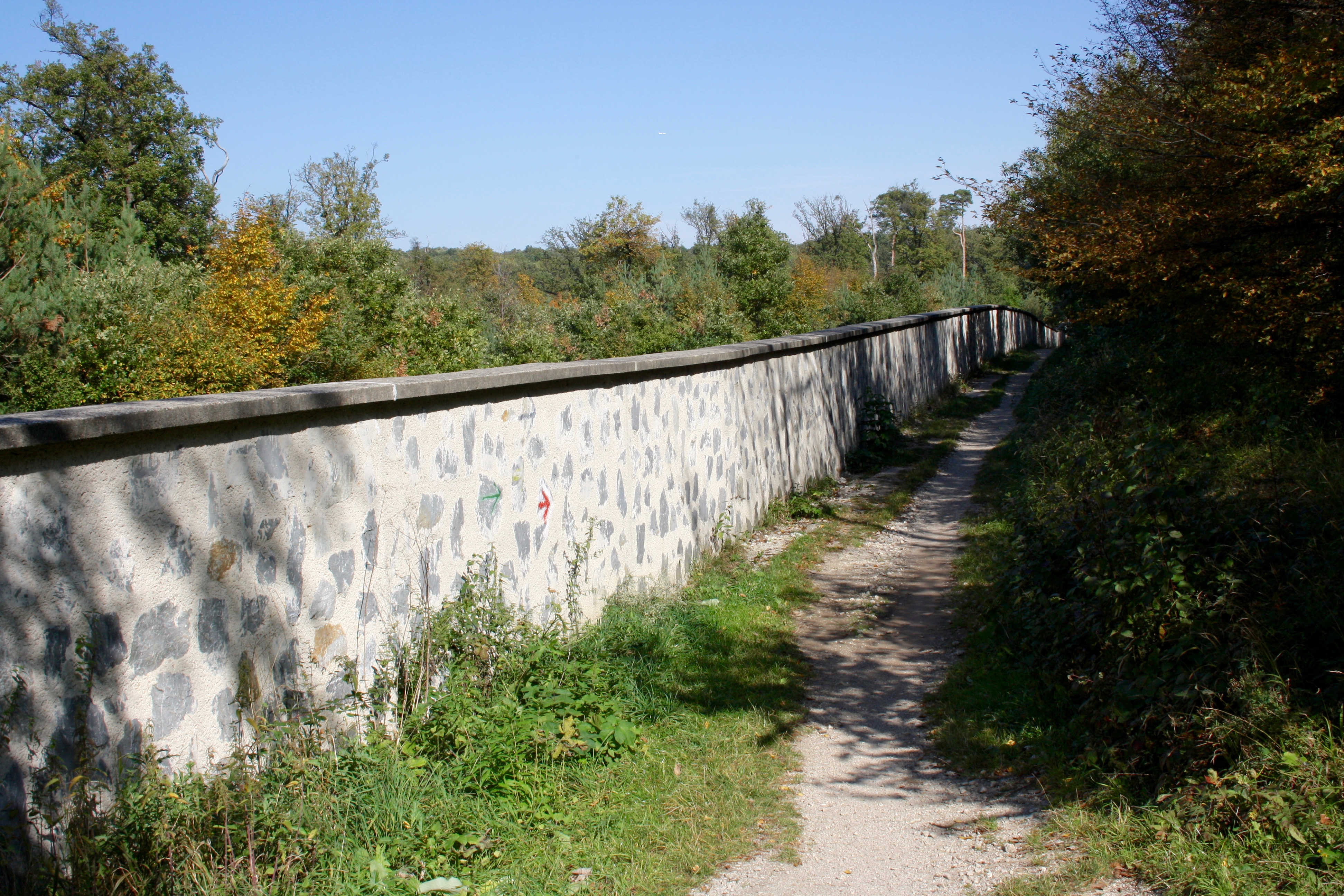 Mauer des Lainzer Tiergartens im Maurer Wald in Wien.